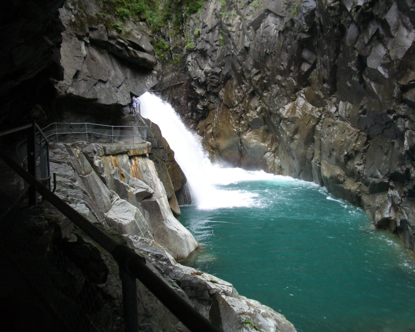 Rofflaschlucht GR, Switzerland